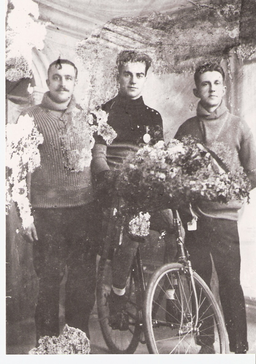 Photo de Georges Lemaire entouré de Jean Nicolet et de son soigneur